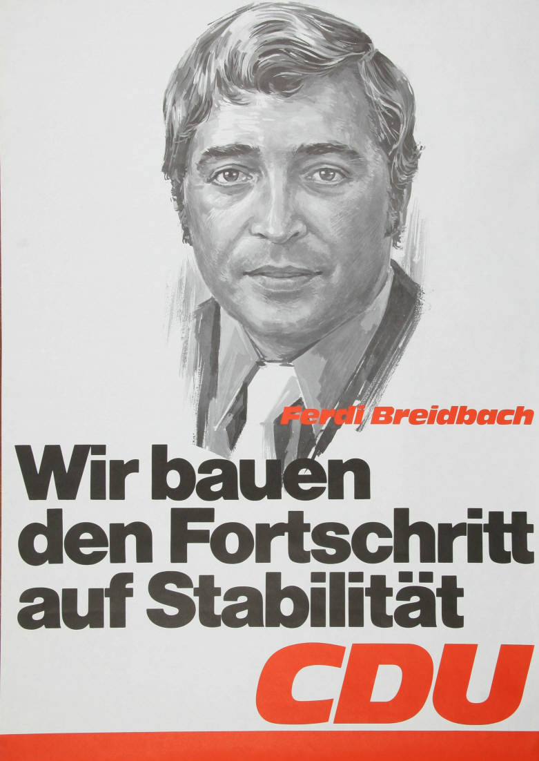 Ferdi Breidbach Slogan Abbildung: Porträtzeichnung Plakatart: Kandidaten-/Personenplakat mit Porträt Auftraggeber: Verantw.: CDU Duisburg Drucker_Druckart_Druckort: Romen, Emmerich Objekt-Signatur: 10-001: 1766 Bestand: Plakate zu Bundestagswahlen (10-001) GliederungBestand10-18: Plakate zu Bundestagswahlen (10-001) » Die 7. Bundestagswahl am 19. November 1972 » CDU » Mit Porträtfoto Lizenz: KAS/ACDP 10-001: 1766 CC-BY-SA 3.0 DE